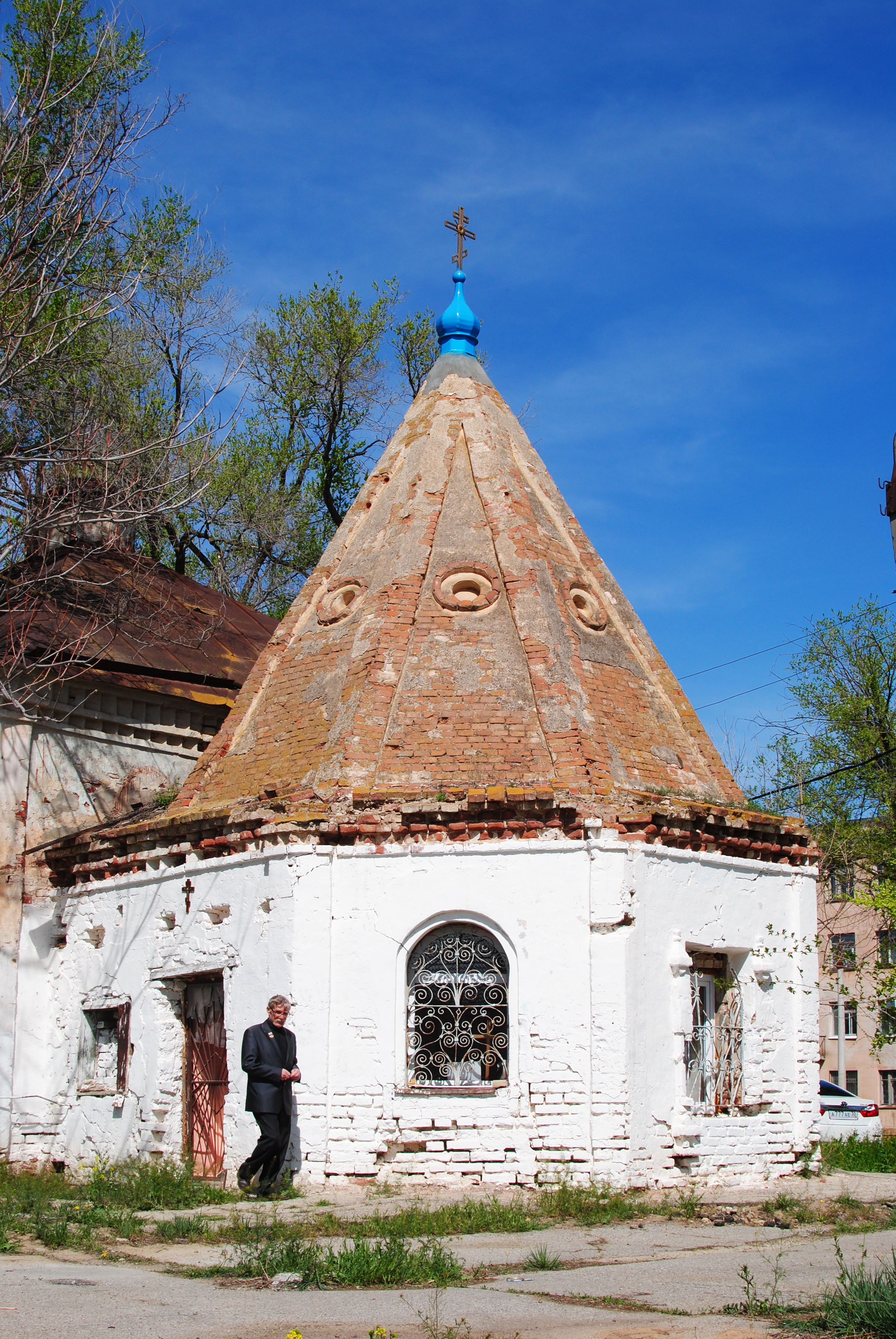 Один из сохранившихся храмов Покрово-Болдинского монастыря (Астрахань)